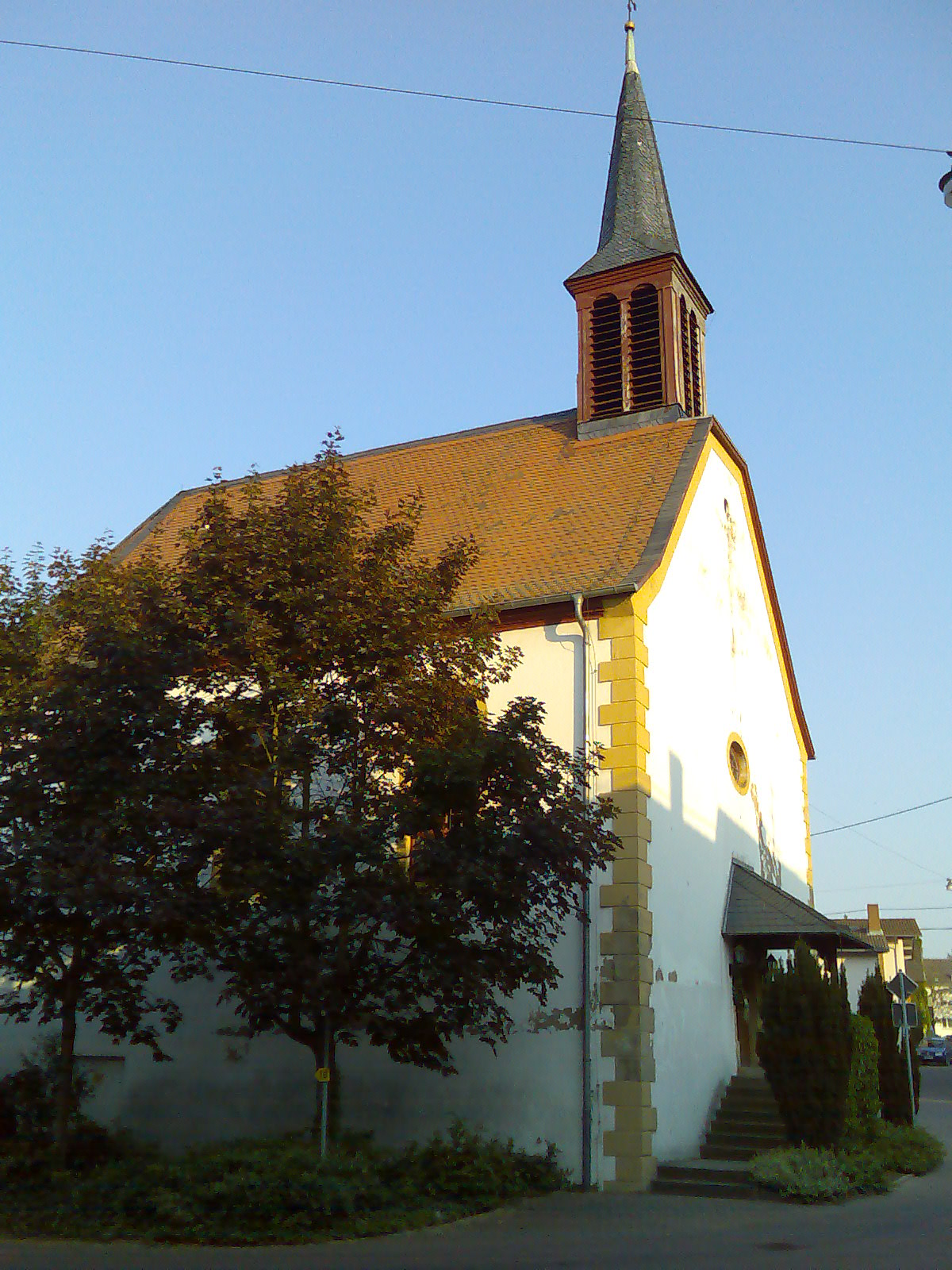 Ev. Kirche in Bubenheim (Rheinhessen)